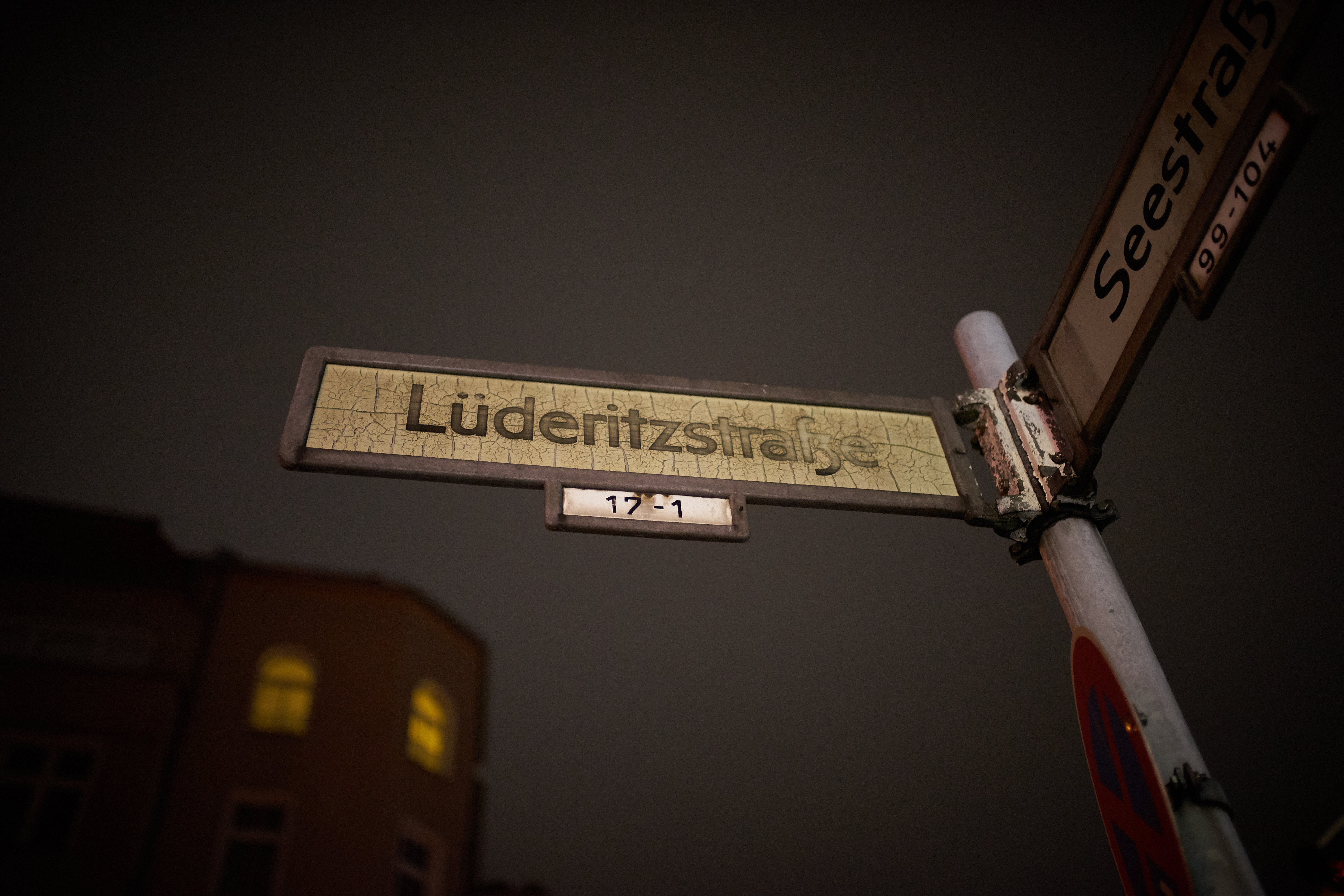 Strassenschild Lüderitzstrasse, Afrikanisches Viertel, Berlin-Wedding. Der Straßenname ehrt den Händler Adolf Lüderitz, der 1883 das Volk der Nama bei einem Landkauf betrog und so den Grundstein zur Kolonie Deutsch-Südwestafrika legte.